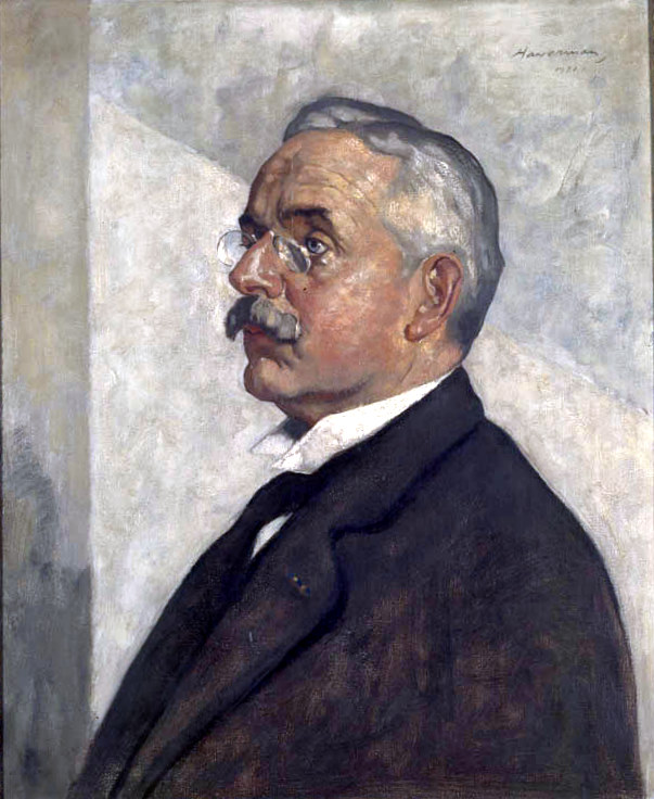 Went, Friedrich A.F.C. Borstbeeld in profiel naar links. Grijs haar en snor. Lorgnet. Donker kostuum met ridderorde en donkere das. Lichtgrijze achtergrond.